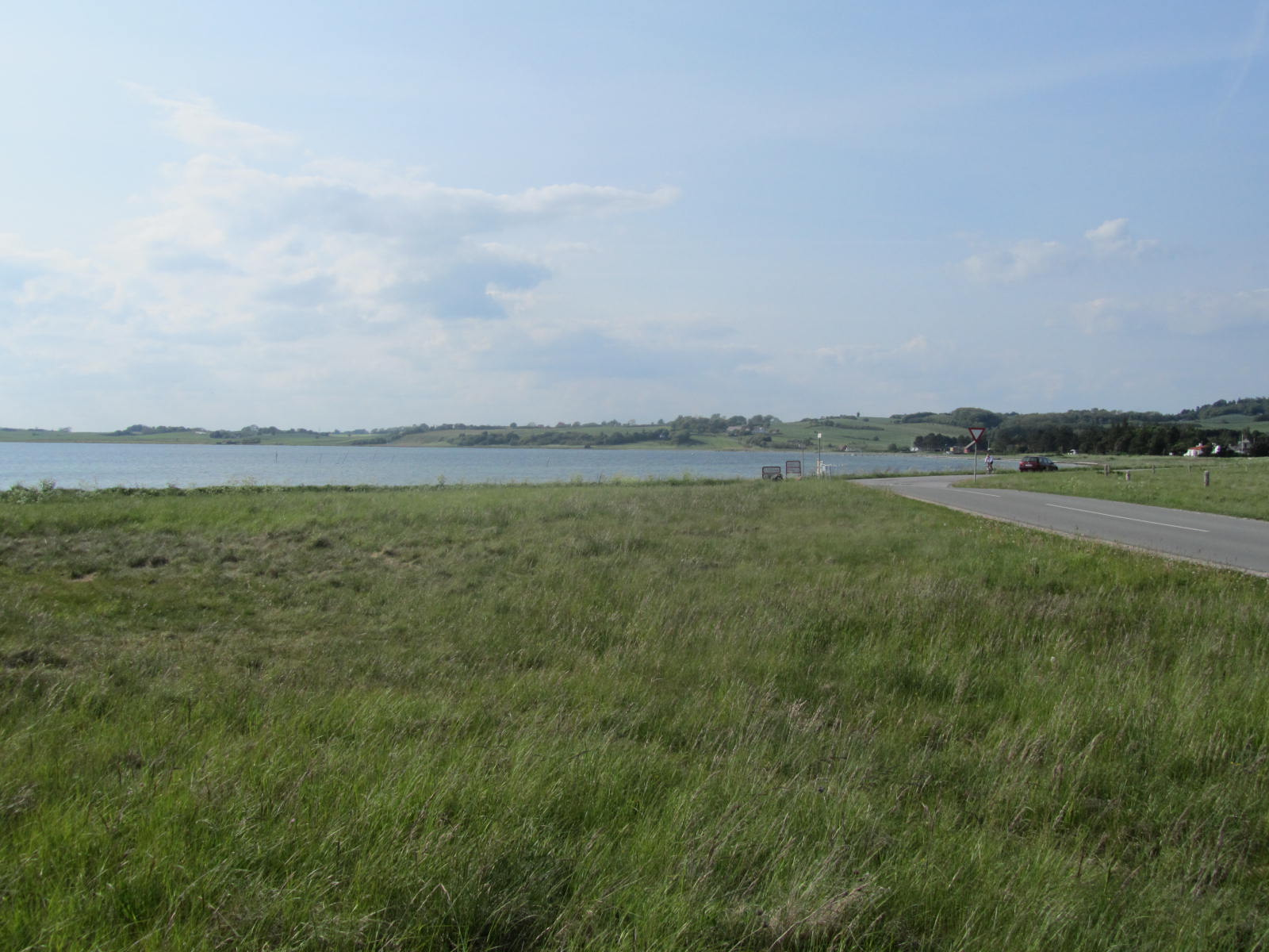 Draget mellem Mols og Helgenæs og Begtrup Vig